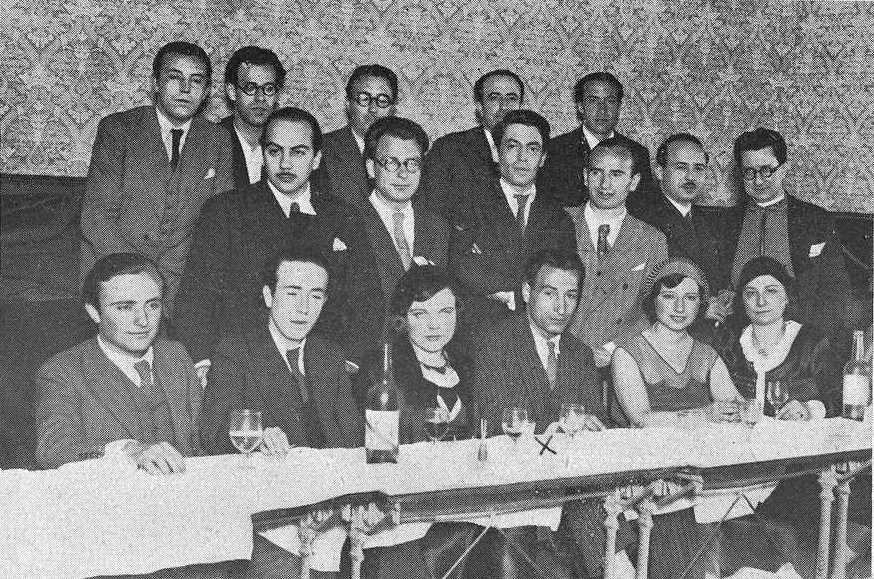 Homenaxe a Manuel Colmeiro pola súa exposición no Círculo de Bellas Artes de Madrid, fotografía en Vida Gallega 1932